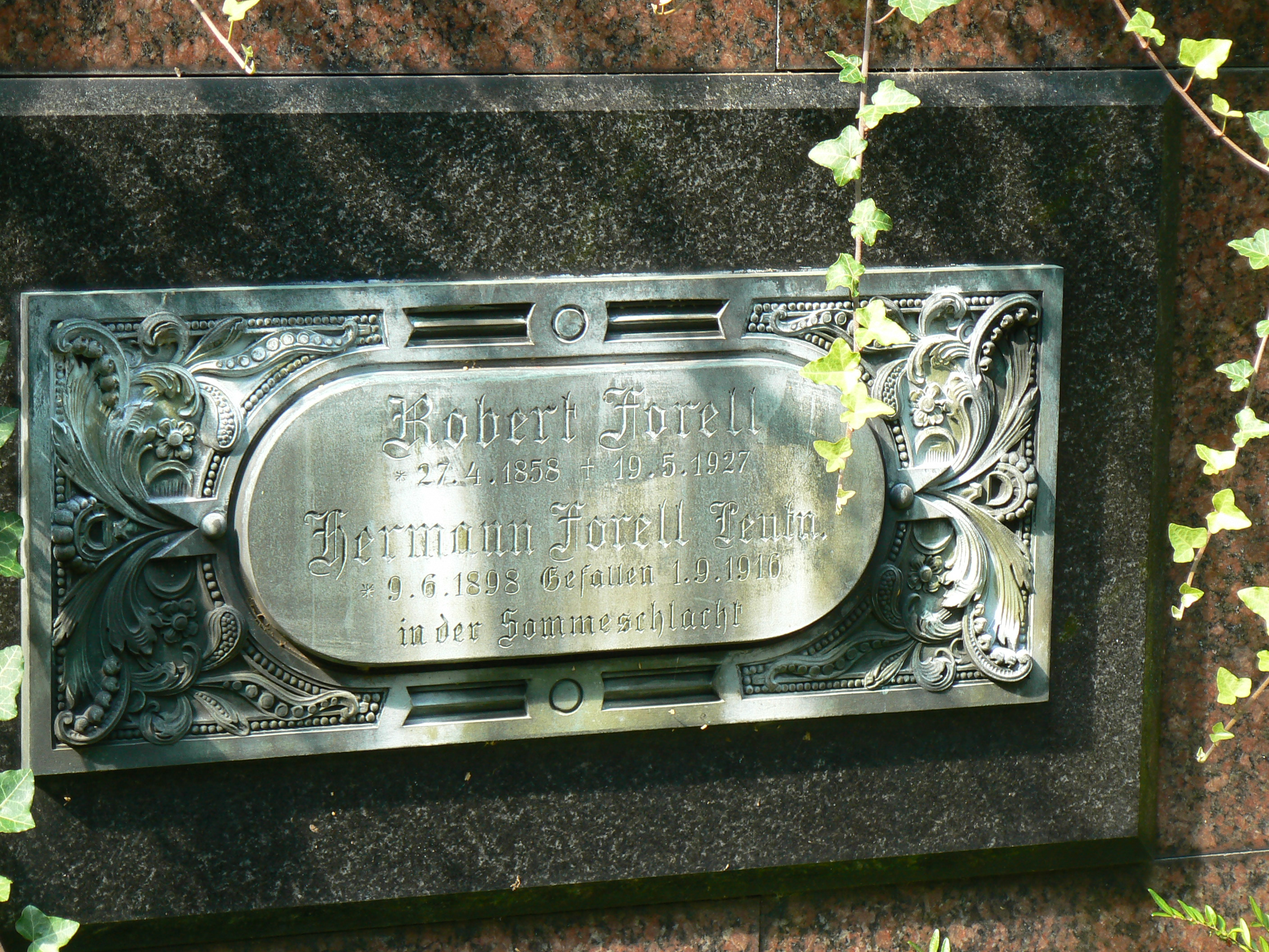 Grabplatte des Bockenheimer Malers Robert Forell, Teil der Familiengrabstätte Knodt-Forell-Kramer (Bildgießerei) auf dem "neuem" Bockenheimer Friedhof, Frankfurt-Bockenheim